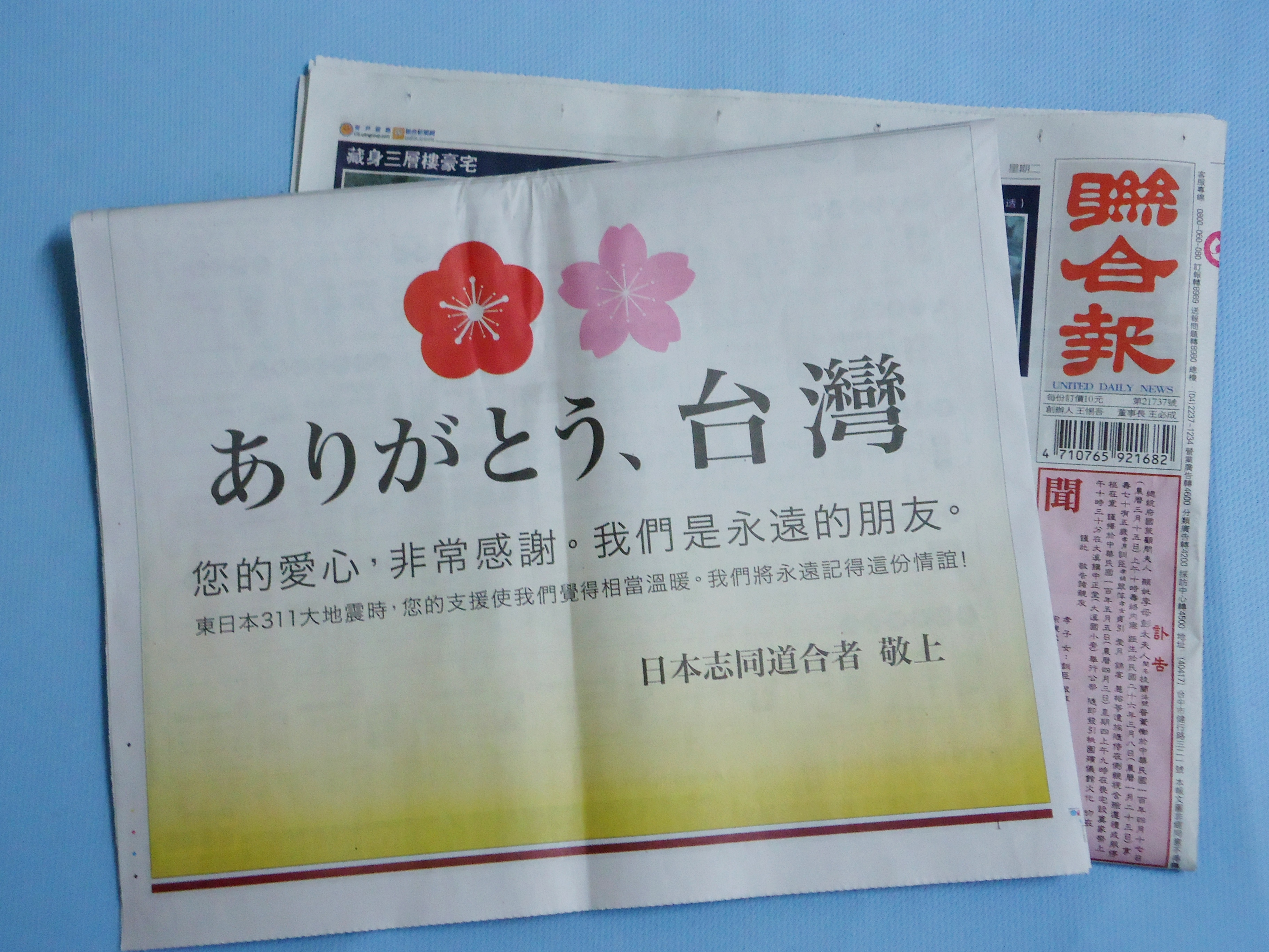 謝謝台灣計畫廣告，刊登於2011年5月3日聯合報A9版。